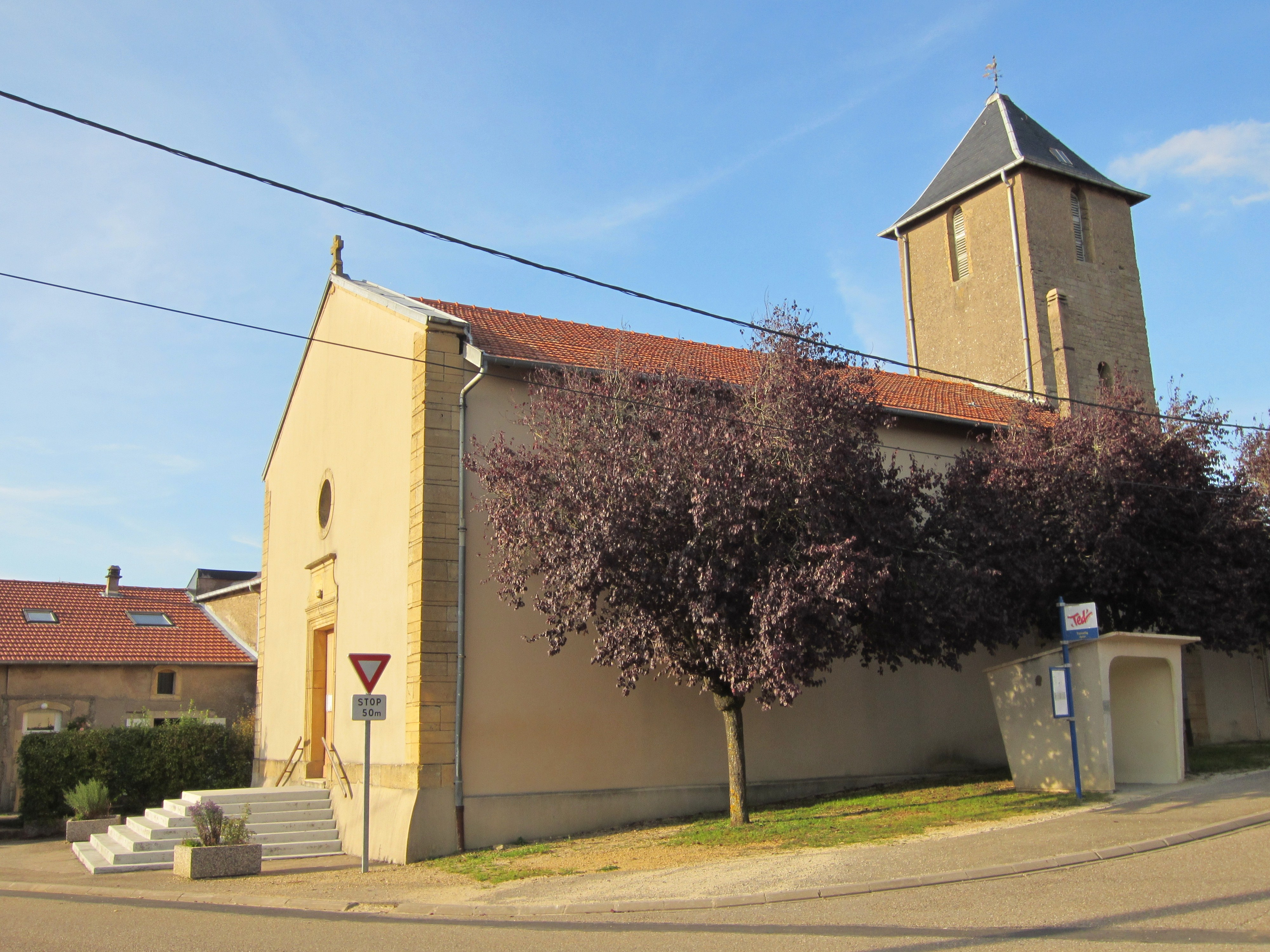 Description Église paroissiale Saint-Epvre Tronville Date25 September 2011Sourcemon appareil photoAuthorAimelaimePermission (Reusing this file) Église paroissiale Saint-Epvre Tronville